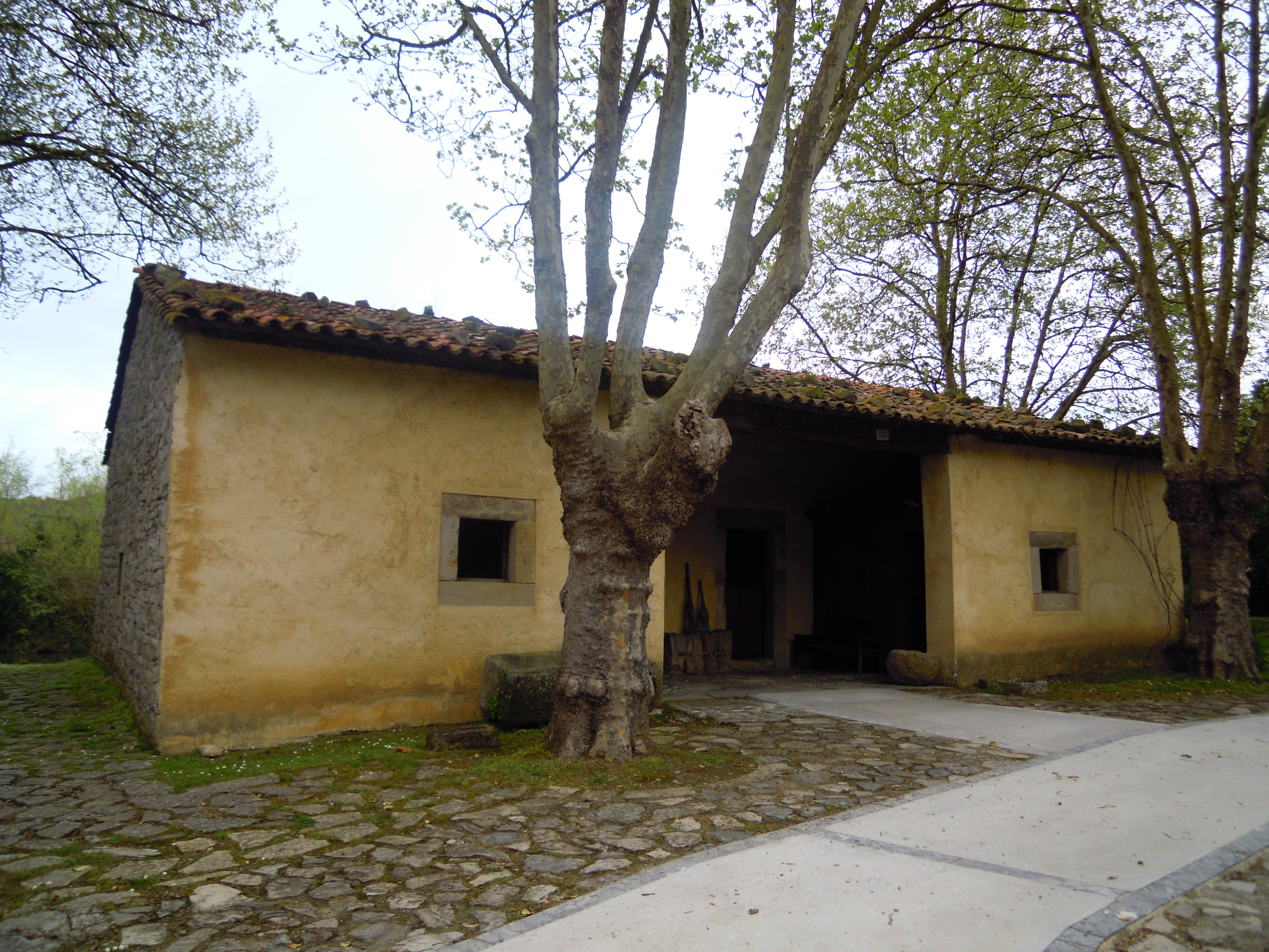 Muséu del Pueblu d'Asturies